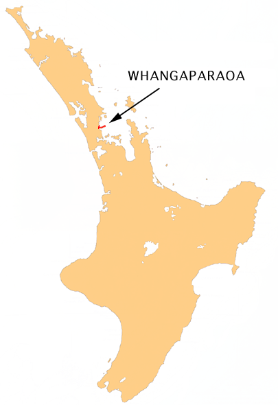 Localisation de Whangaparaoa, sur la carte de l'Ile du Nord